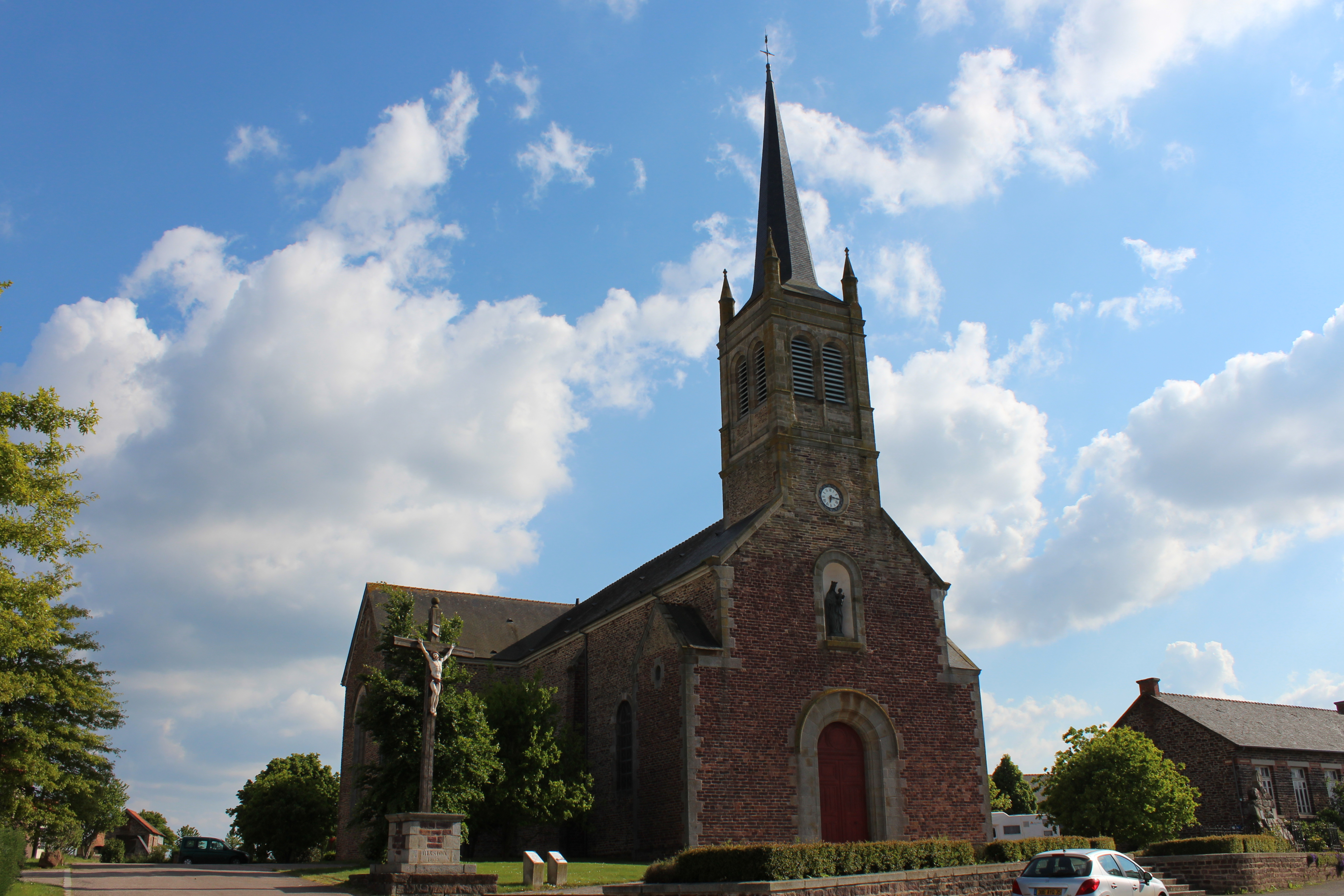 Église de Muel (Ille-et-Vilaine).